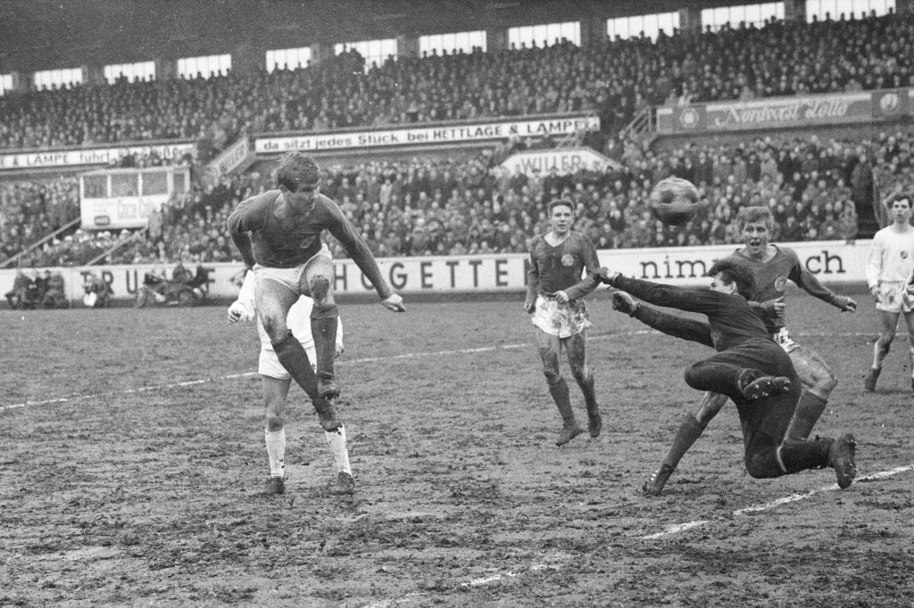 im Holsteinstadion. Im Bild u.a. Holsteins Stürmer Gerd Koll (4.v.r.).